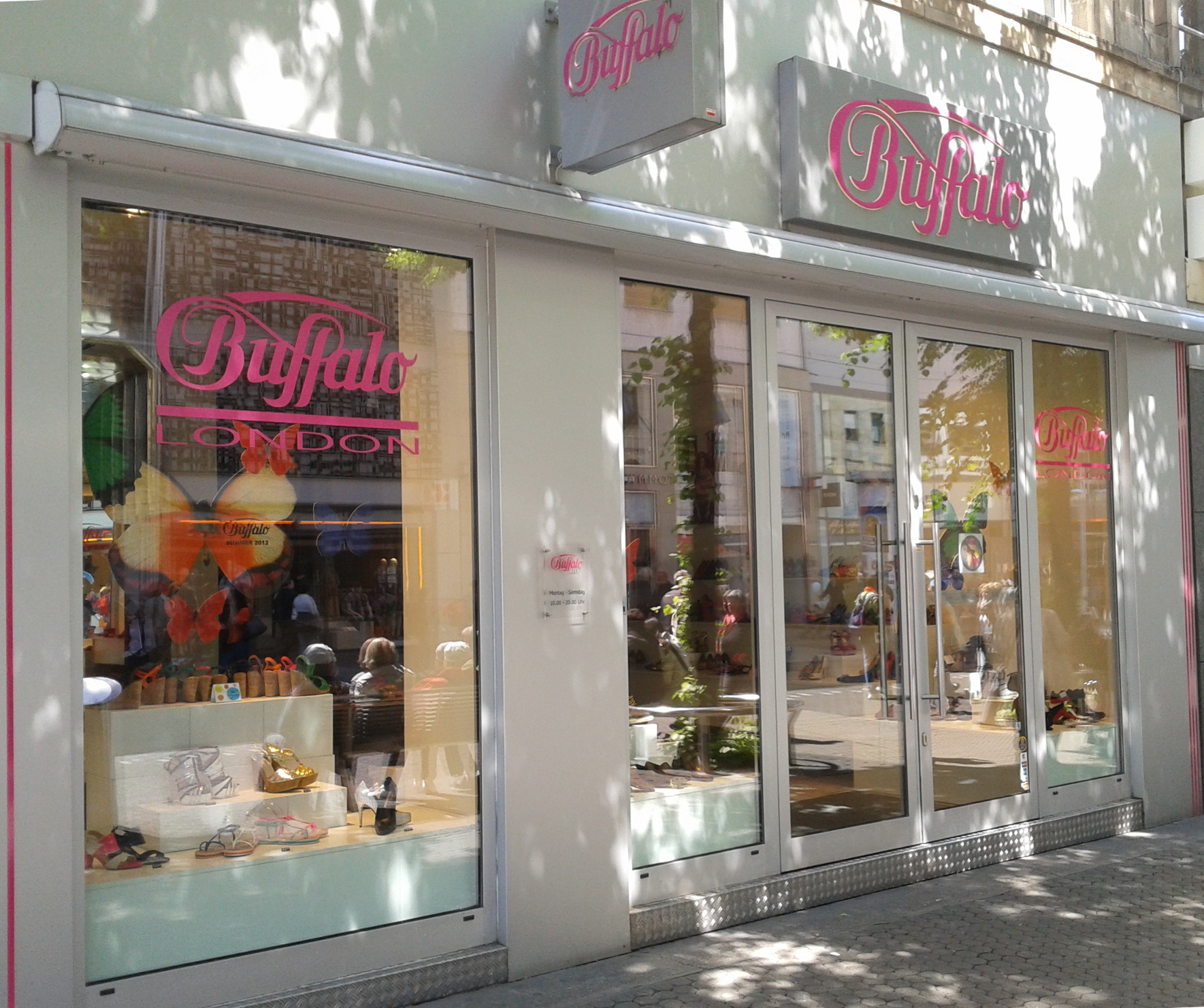 Buffalo-Geschäft in Mannheim, P6, 1